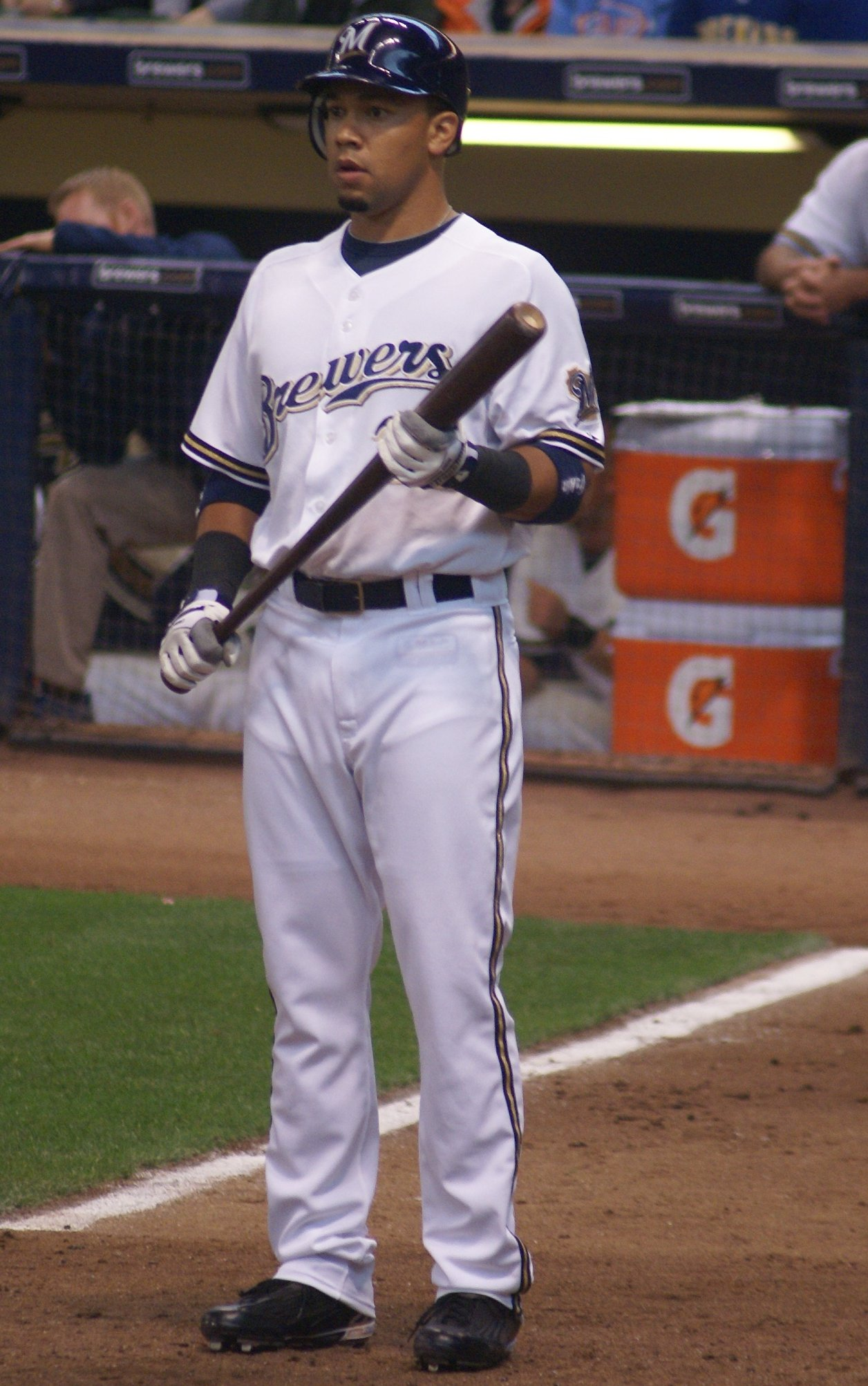 Jody Gerut